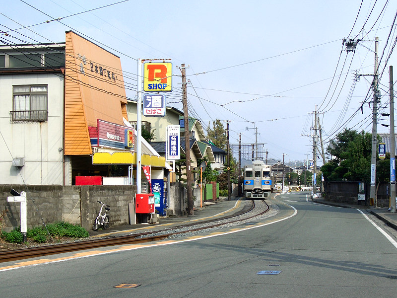 黒髪町駅－藤崎宮前駅間の併用軌道区間 手前が藤崎宮前駅方面、奥が北熊本駅方面。